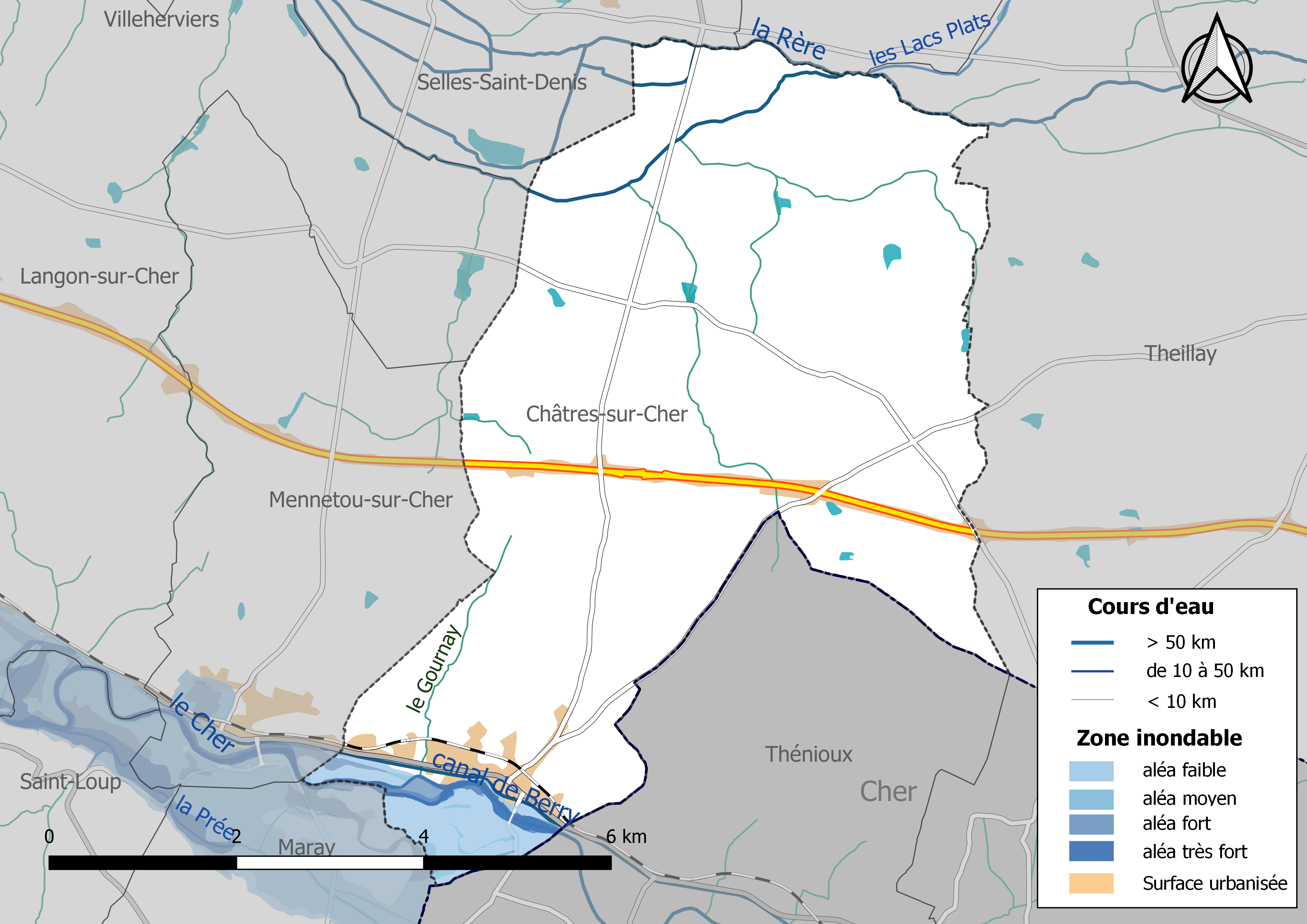 Carte des zones inondables de la commune de Châtres-sur-Cher (France).